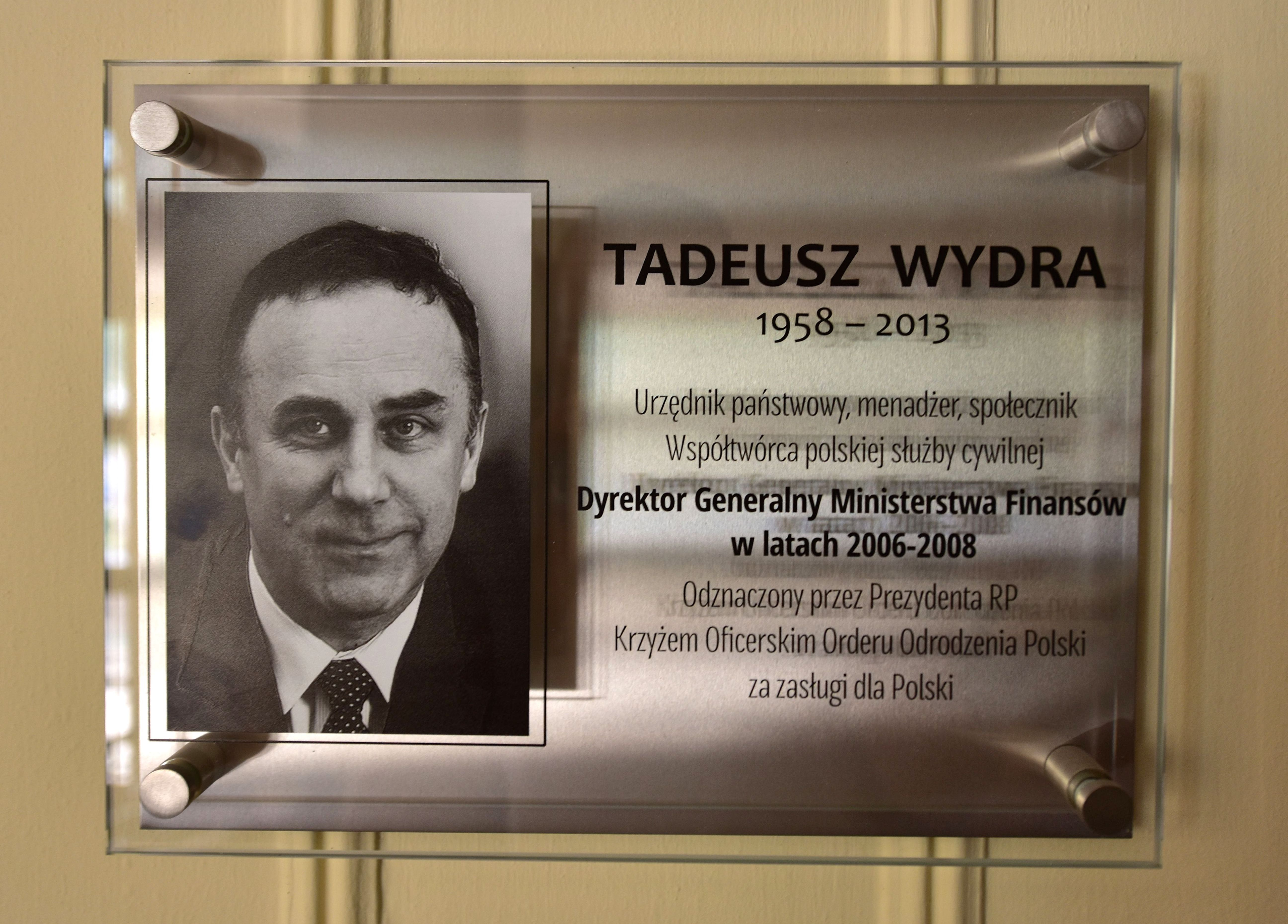 Tablica upamiętniająca Tadeusza Wydrę w budynku F kompleksu Ministerstwa Finansów przy ul. Świętokrzyskiej 12 w Warszawie